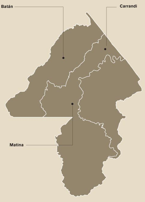 Mapa de los distritos del cantón de Matina, provincia de Limón, Costa Rica.